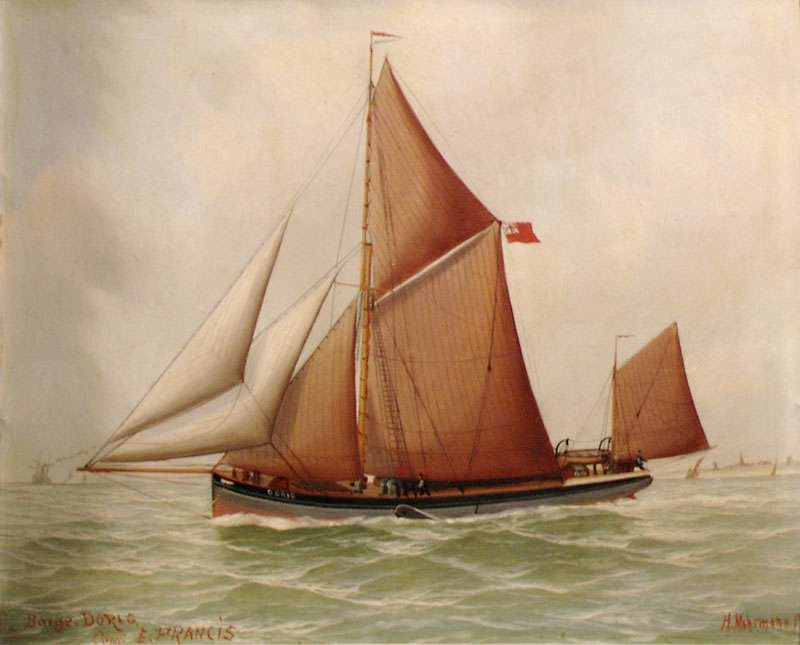 Scheepsportret van de Barge 'Dorig'. door John-Henry Mohrmann